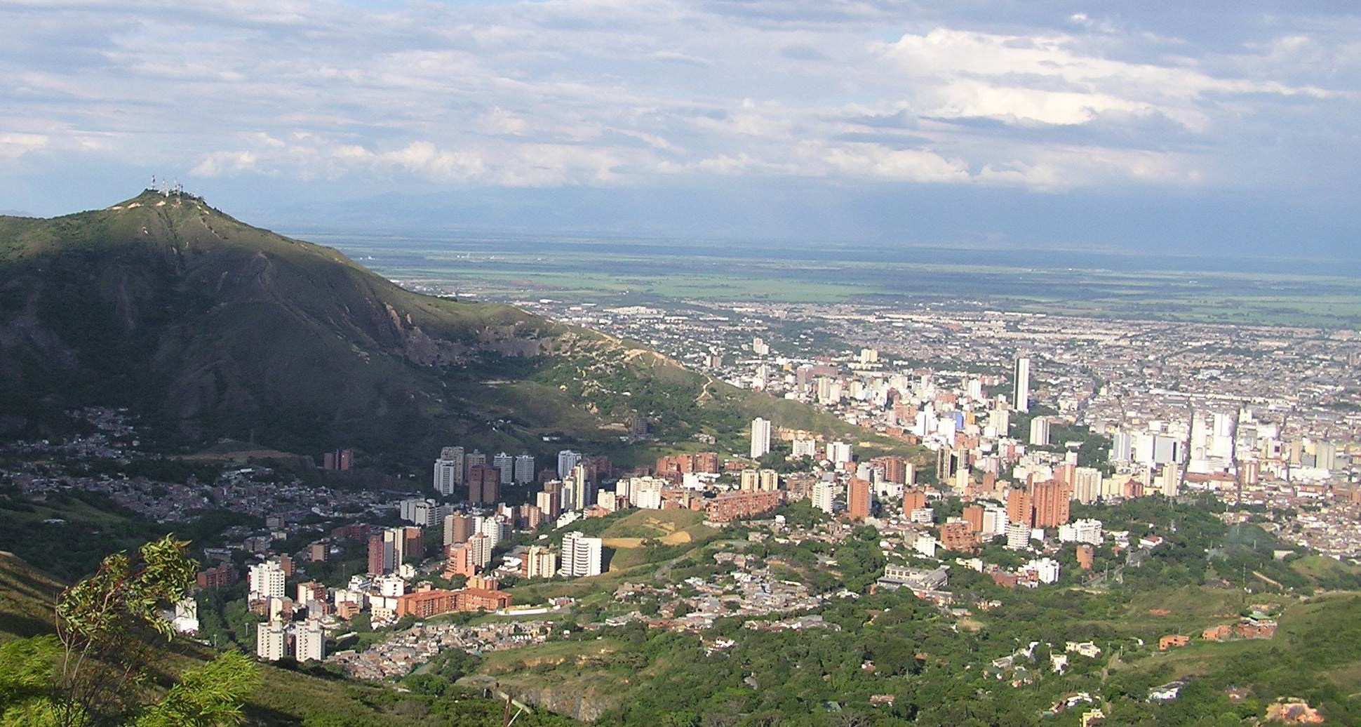 Vista de Cali desde Cristo Rey. Se ven el cerro de las Tres Cruces, el centro de la ciudad y al fondo el Valle del Cauca.